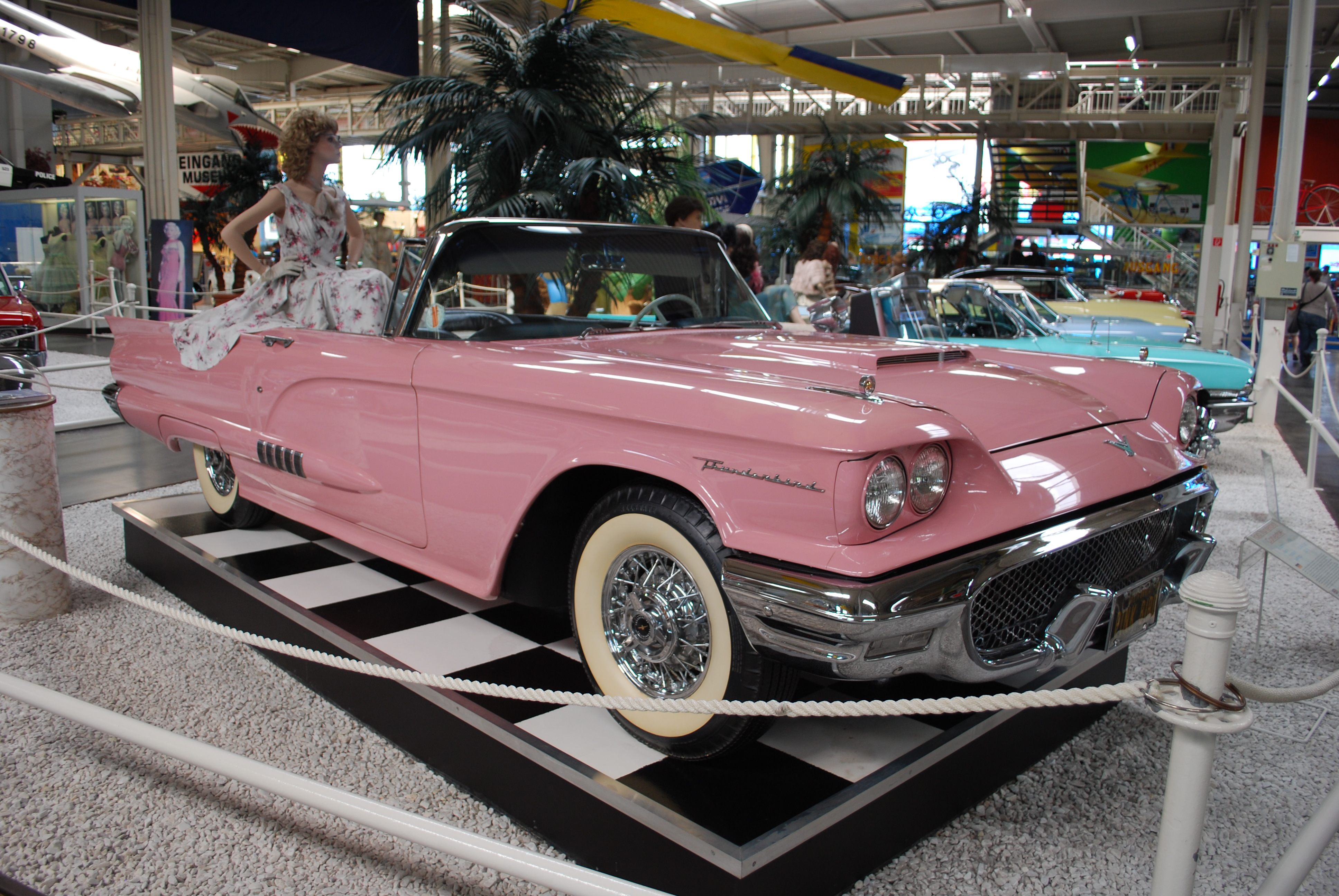 1958 Ford Thunderbird at the Auto & Technik Museum, Sinsheim, 6/11.